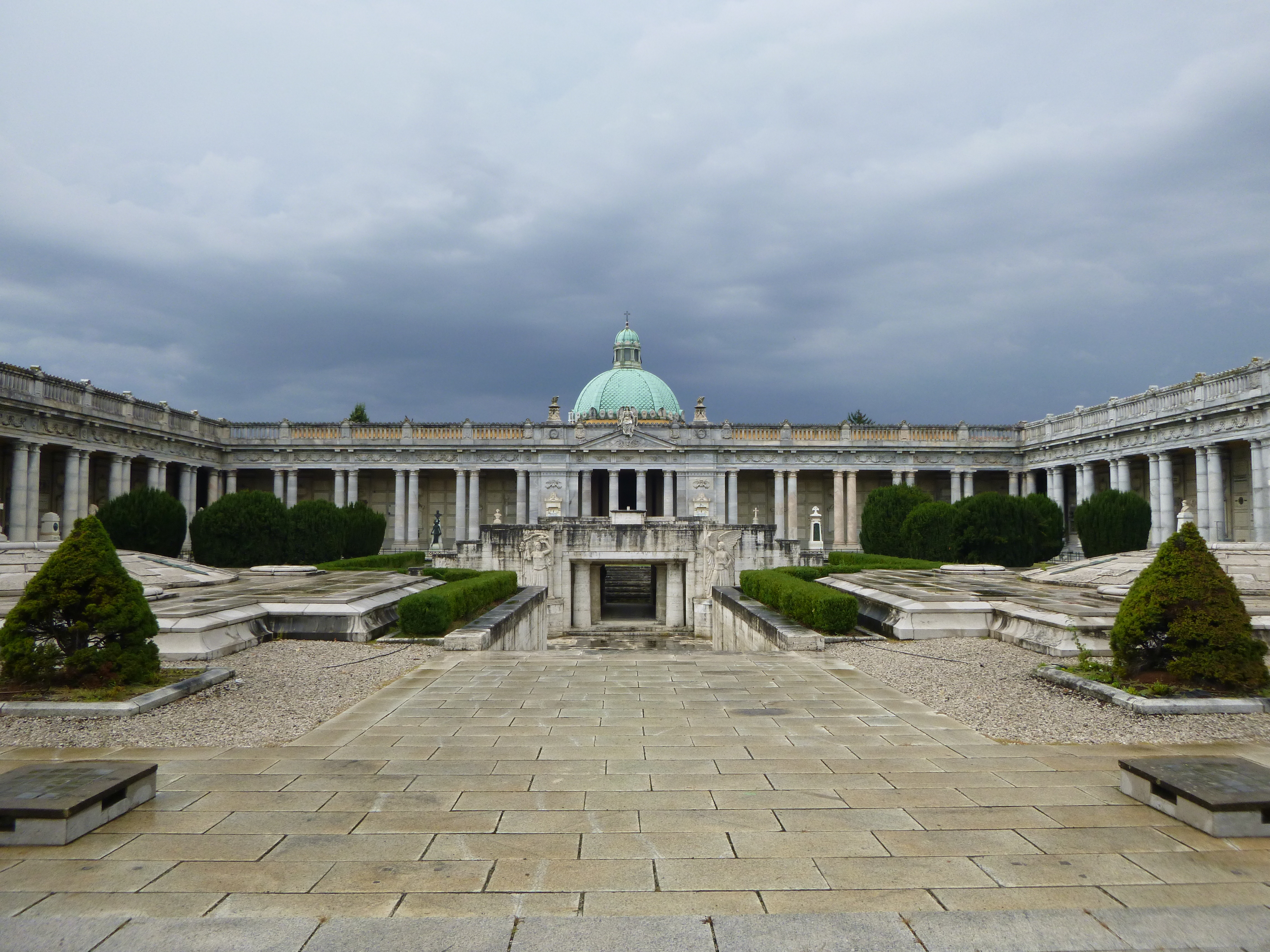 Ehrenhof für Gefallene des Ersten Weltkriegs in der Certosa di Bologna, dem historischen Stadtfriedhof von Bologna.